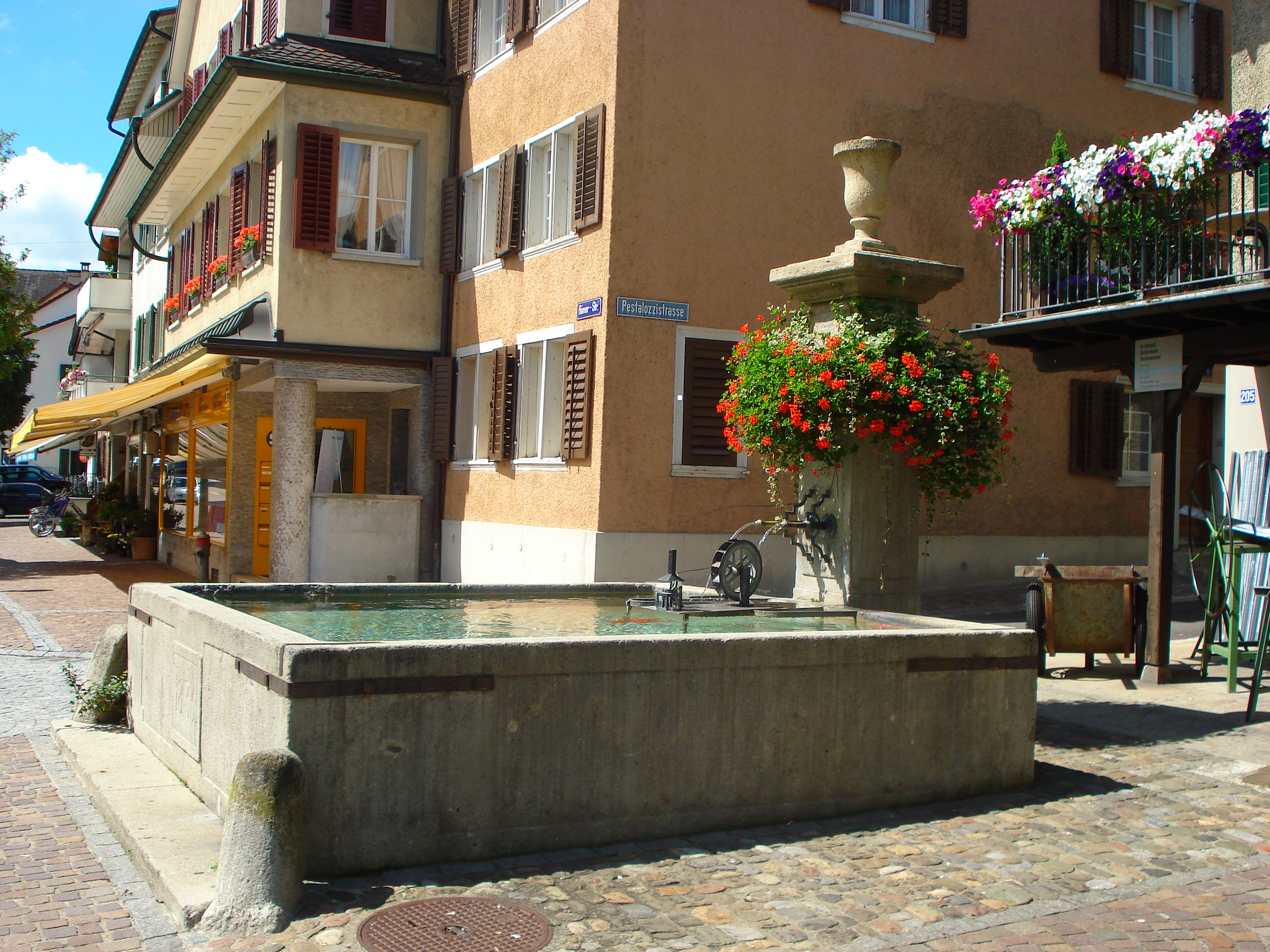 Brunnen im Dorfzentrum des Winterthurer Stadtkreises „Oberwinterthur“ aus dem Jahr 1833